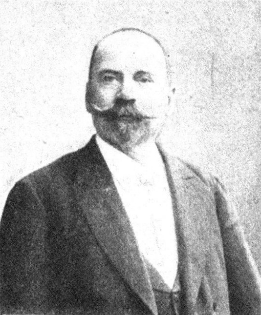 Österreichischer Politiker, Reichsratswahl 1907, Name siehe Dateiname